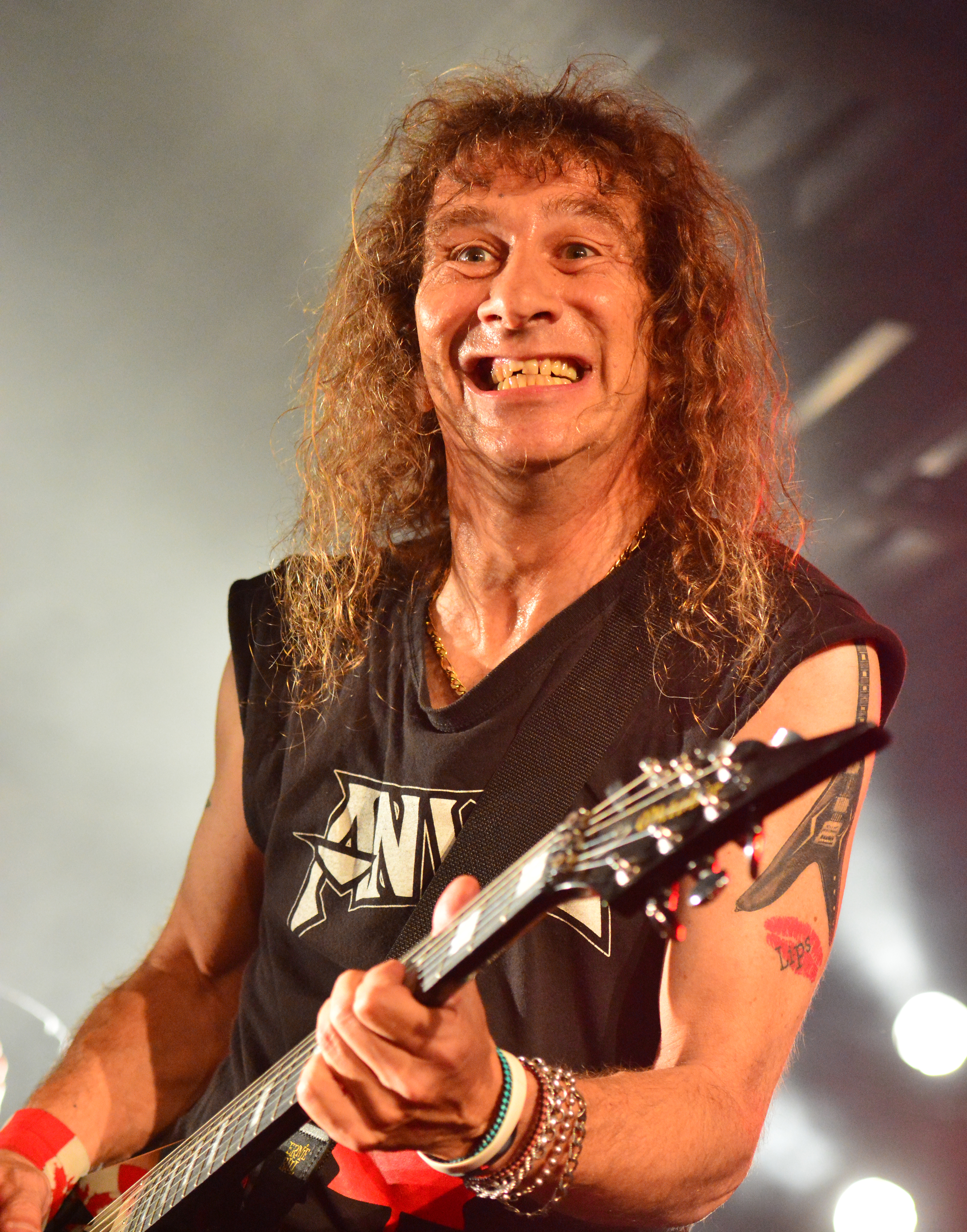 Steve „Lips“ Kudlow von Anvil beim Headbangers Open Air 2014